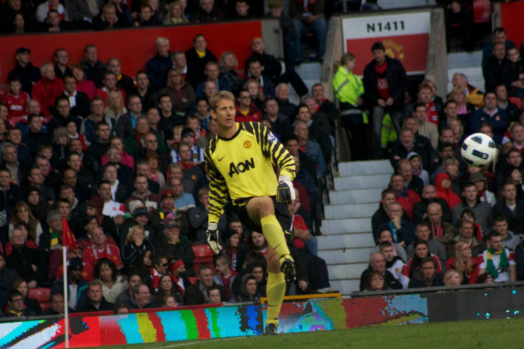 Edwin van der Sar